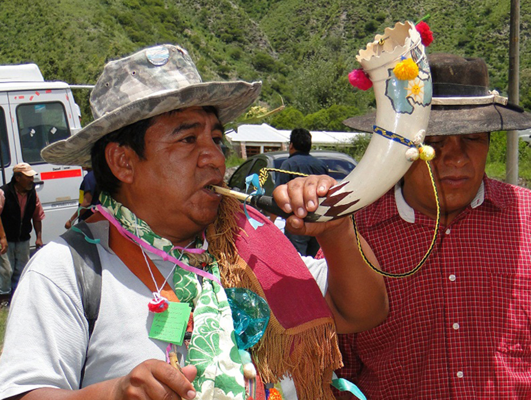 Tocando el Erkencho